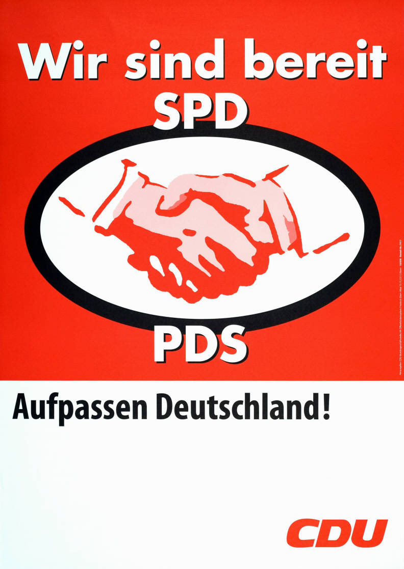 Wir sind bereit SPD PDS Aufpassen Deutschland! CDU Abbildung: Händedruck (Graphik) Kommentar: Plakat aus dem Vorfeld des Wahlkampfs (Juni) Plakatart: Motiv-/Textplakat Auftraggeber: CDU-Bundesgeschäftsstelle, Hauptabteilung Öffentlichkeitsarbeit, Bonn Objekt-Signatur: 10-001: 5001 Bestand: Plakate zu Bundestagswahlen (10-001) GliederungBestand10-18: Plakate zu Bundestagswahlen (10-001) » Die 14. Bundestagswahl am 27. September 1998 » Motivplakate Lizenz: KAS/ACDP 10-001: 5001 CC-BY-SA 3.0 DE